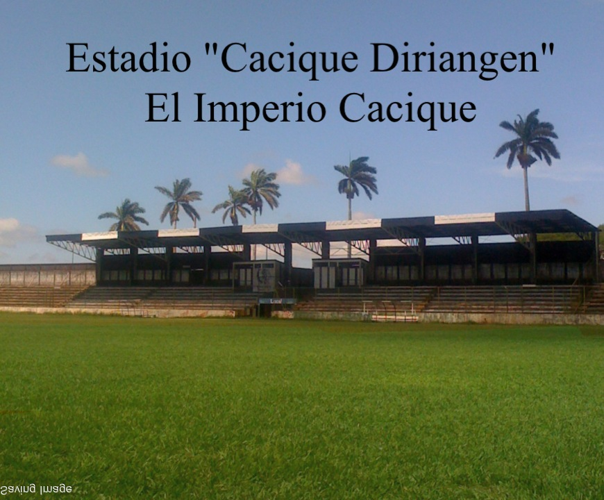 El Imperio Cacique